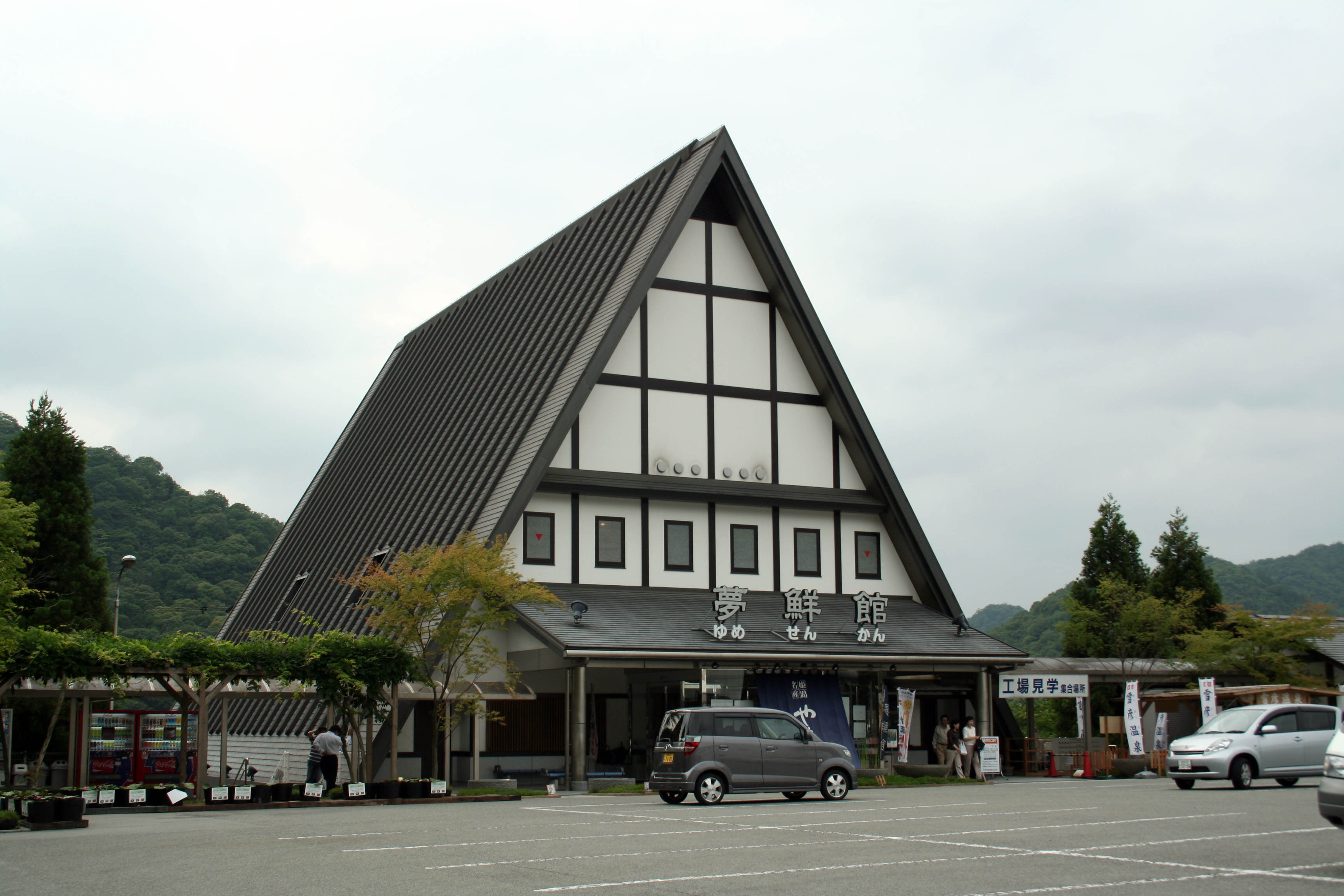 ヤマサ蒲鉾株式会社本社敷地内にある店。